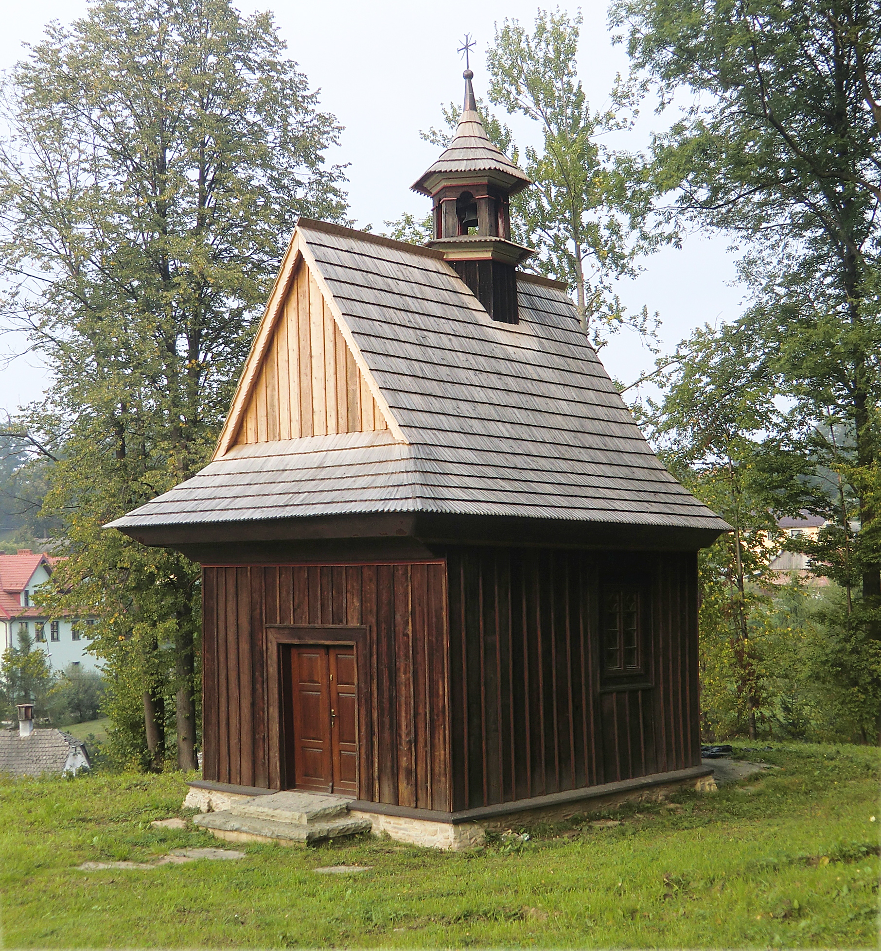 Herz-Jesu-Kapelle in Rychwałd (Reichwald)